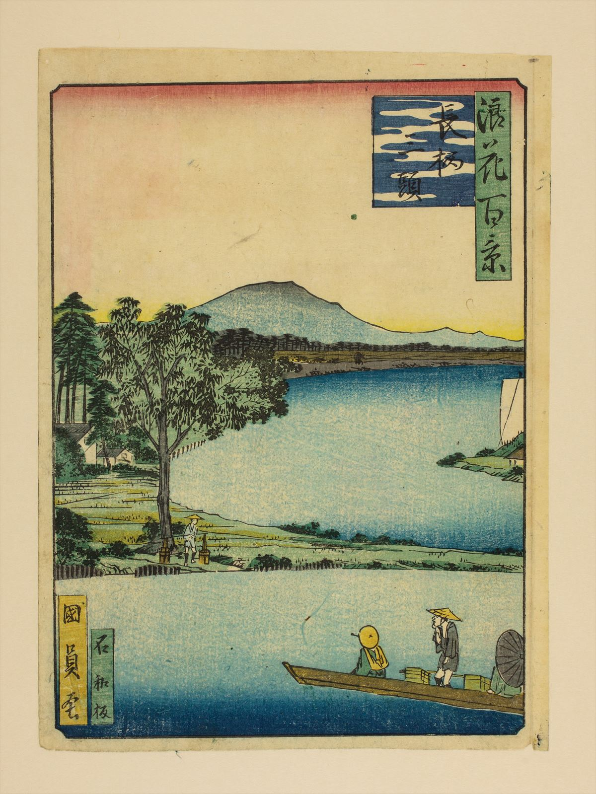 1800年代。歌川國員/画。浪花百景 102枚のうちの1枚。大阪市立中央図書館蔵。